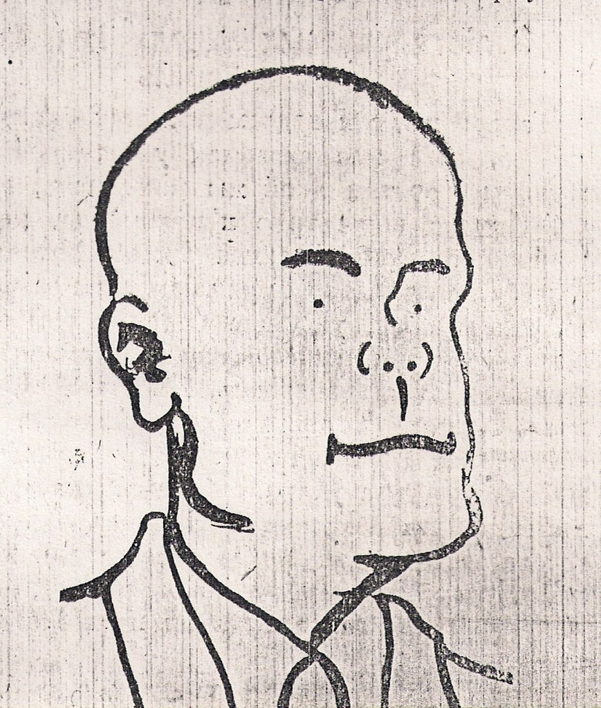 Беларуская (тарашкевіца): Сяброўскі шарж на беларускага паэта Максіма Лужаніна